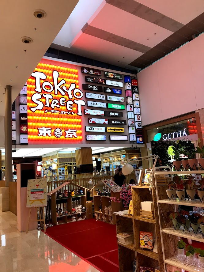 柏威年廣場東京街入口